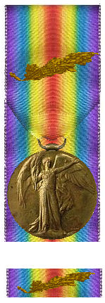 Intergeallieerde Overwinningsmedaille 1914 -1918